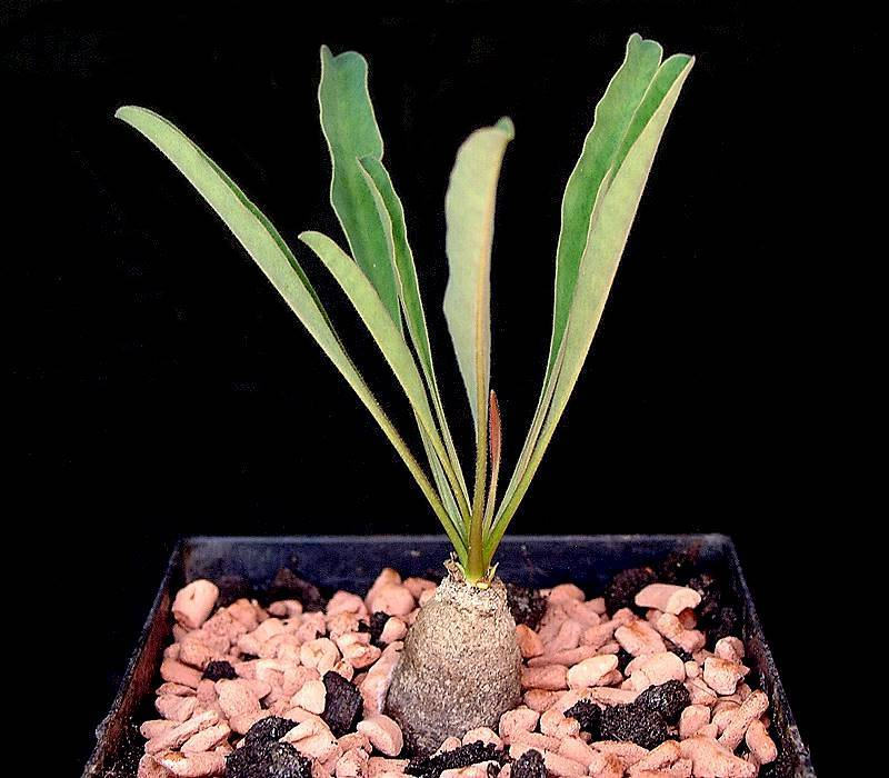 Euphorbia silenifolia